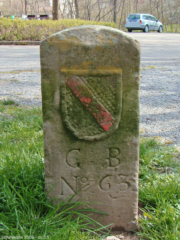 Grenzstein zwischen Baden und der ehemaligen hessischen Exklave in Zimmerhof, badische Seite